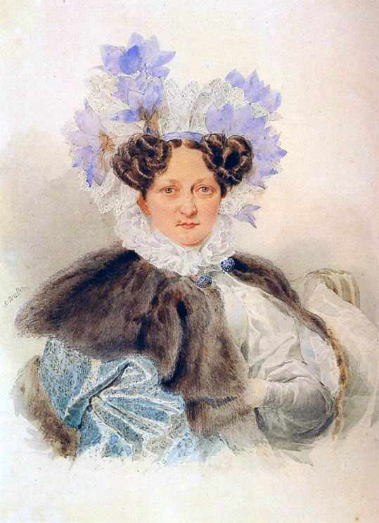 Екатерина Ивановна Загряжская (1779-1842), фрейлина, сестра Н.И.Гончаровой, тётка Н.Н.Пушкиной.